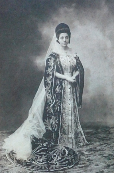 Асреньева Надежда Дмитриевна